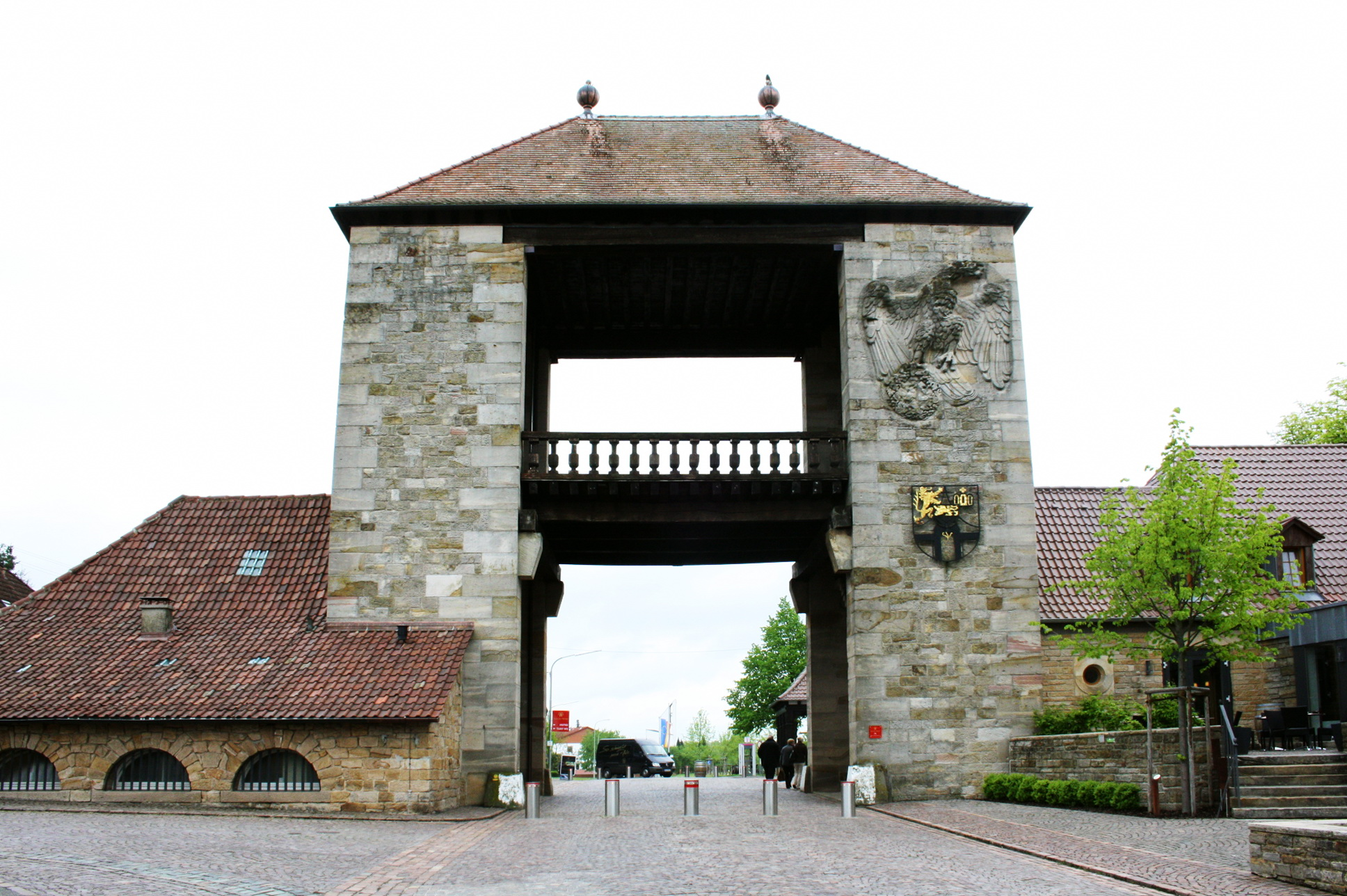 Deutsches Weintor in Schweigen-Rechtenbach (Rheinland-Pfalz) vom Süden gesehen.